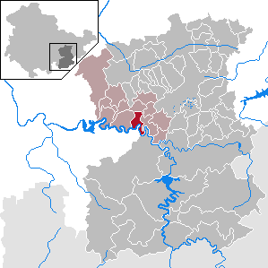 Paska in Thuringia - Saale-Orla-Kreis